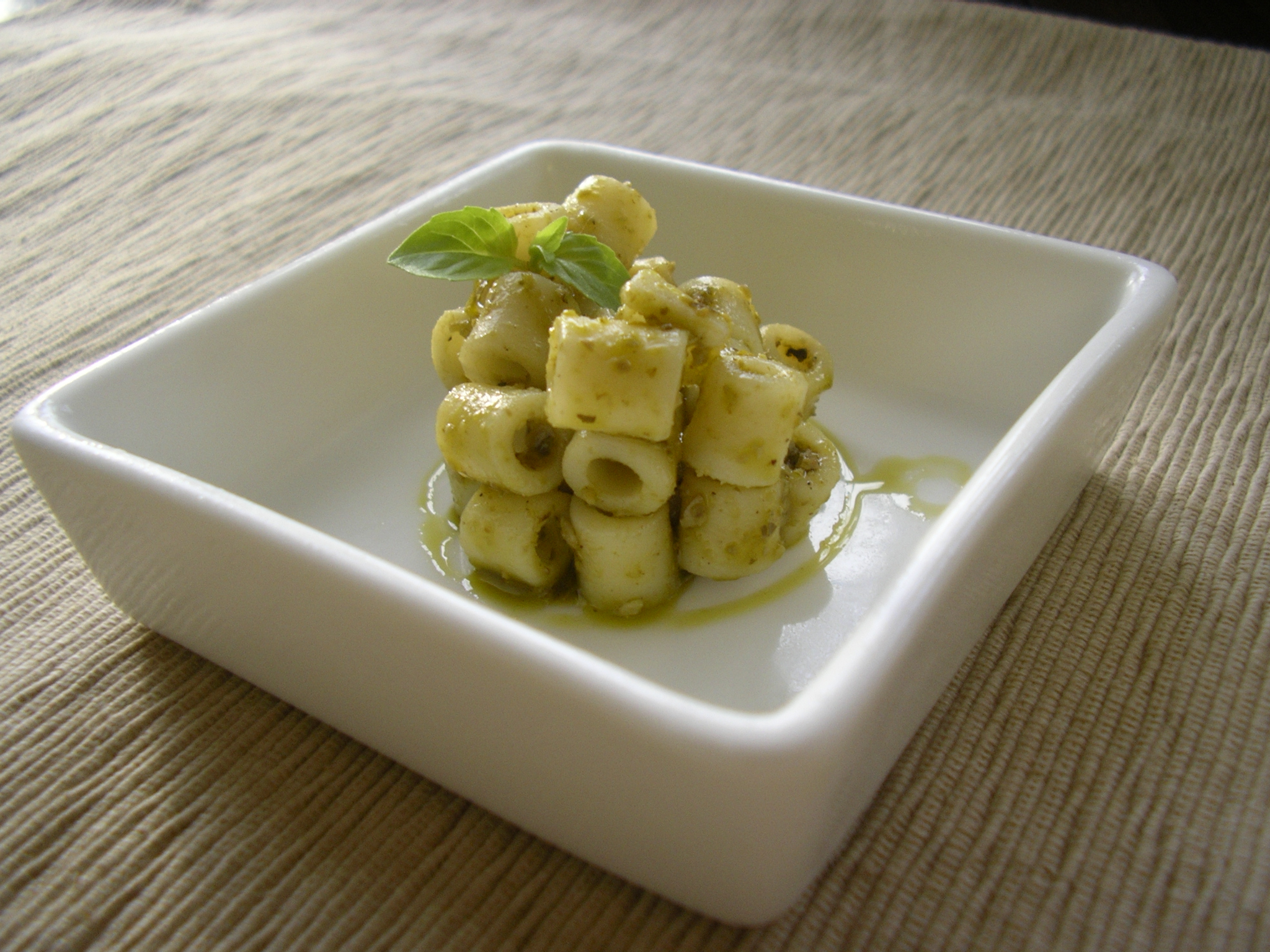 Ditalini pesto appetizer